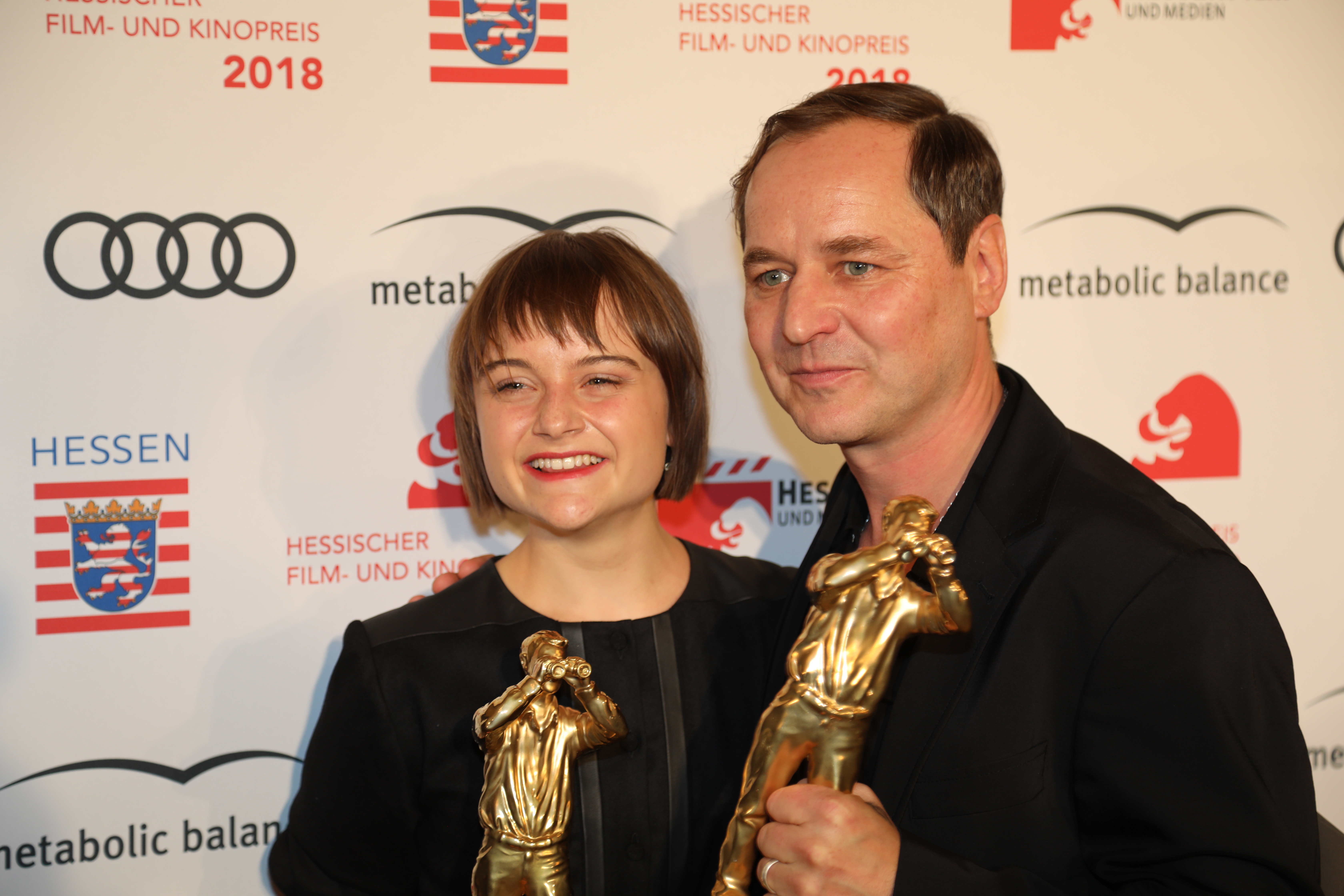 Lena Urzendowsky und Thomas Schmauser beim Hessischen Film- und Kinopreis 2018